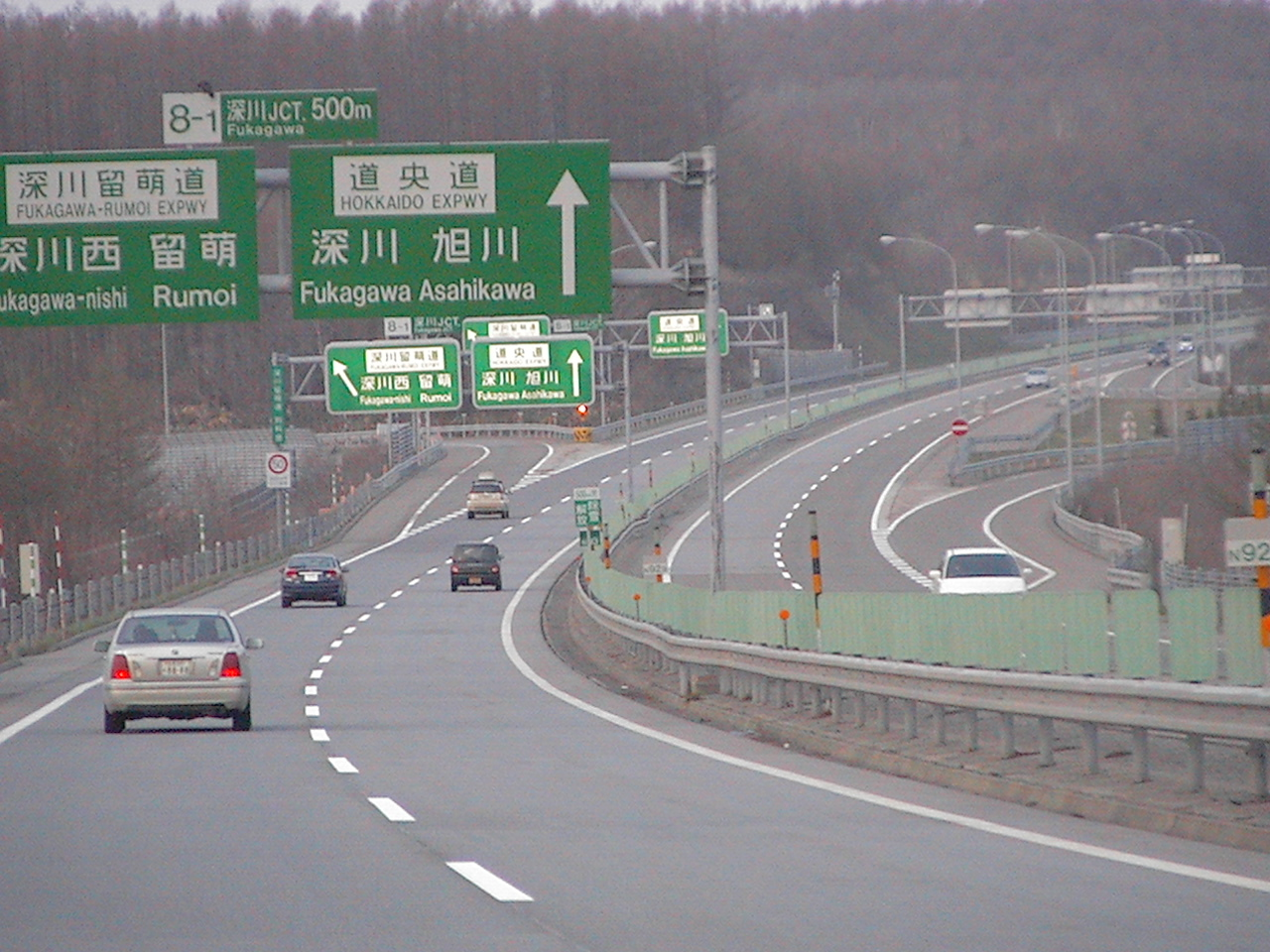 深川JCT（道央道を旭川方面）